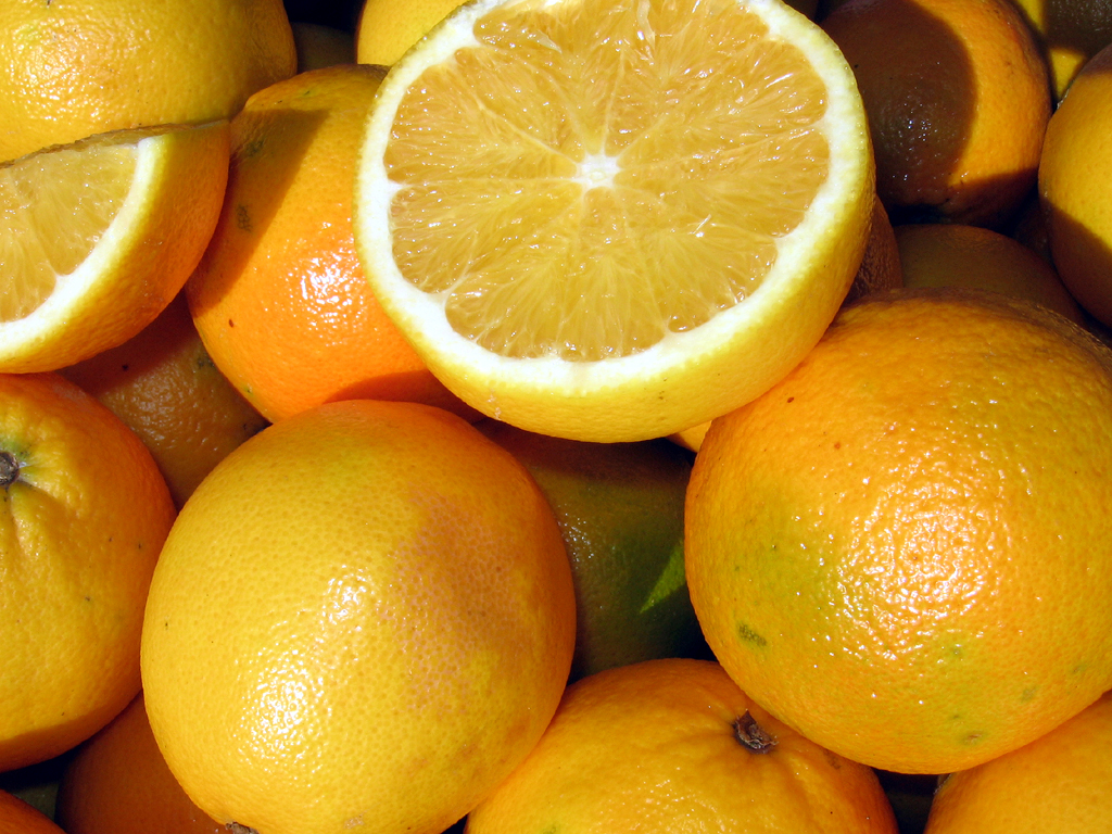 Arance gialle da spremuta Autore: Paolo Ciarlantini